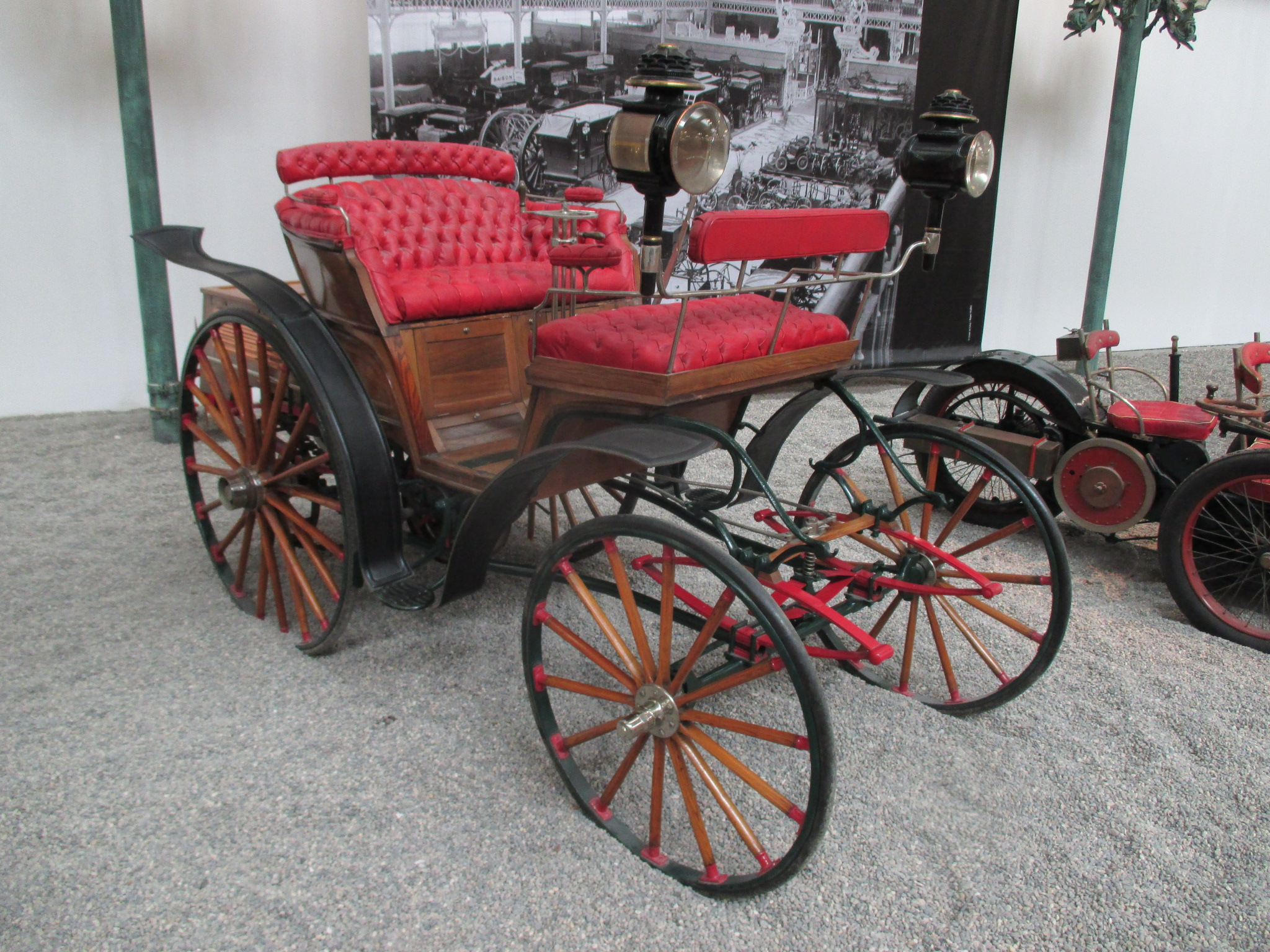 Benz Vis-à-Vis, 1893, Cité de l'automobile de Mulhouse